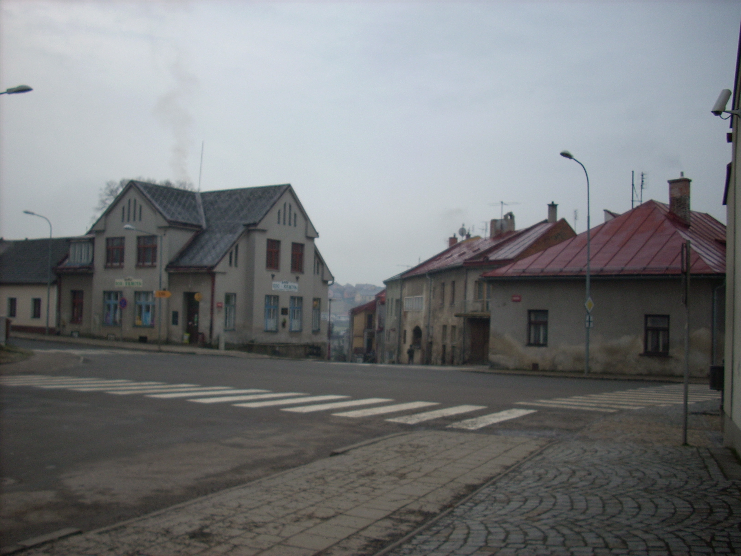 Křižovatka Palackého Indusova Polná